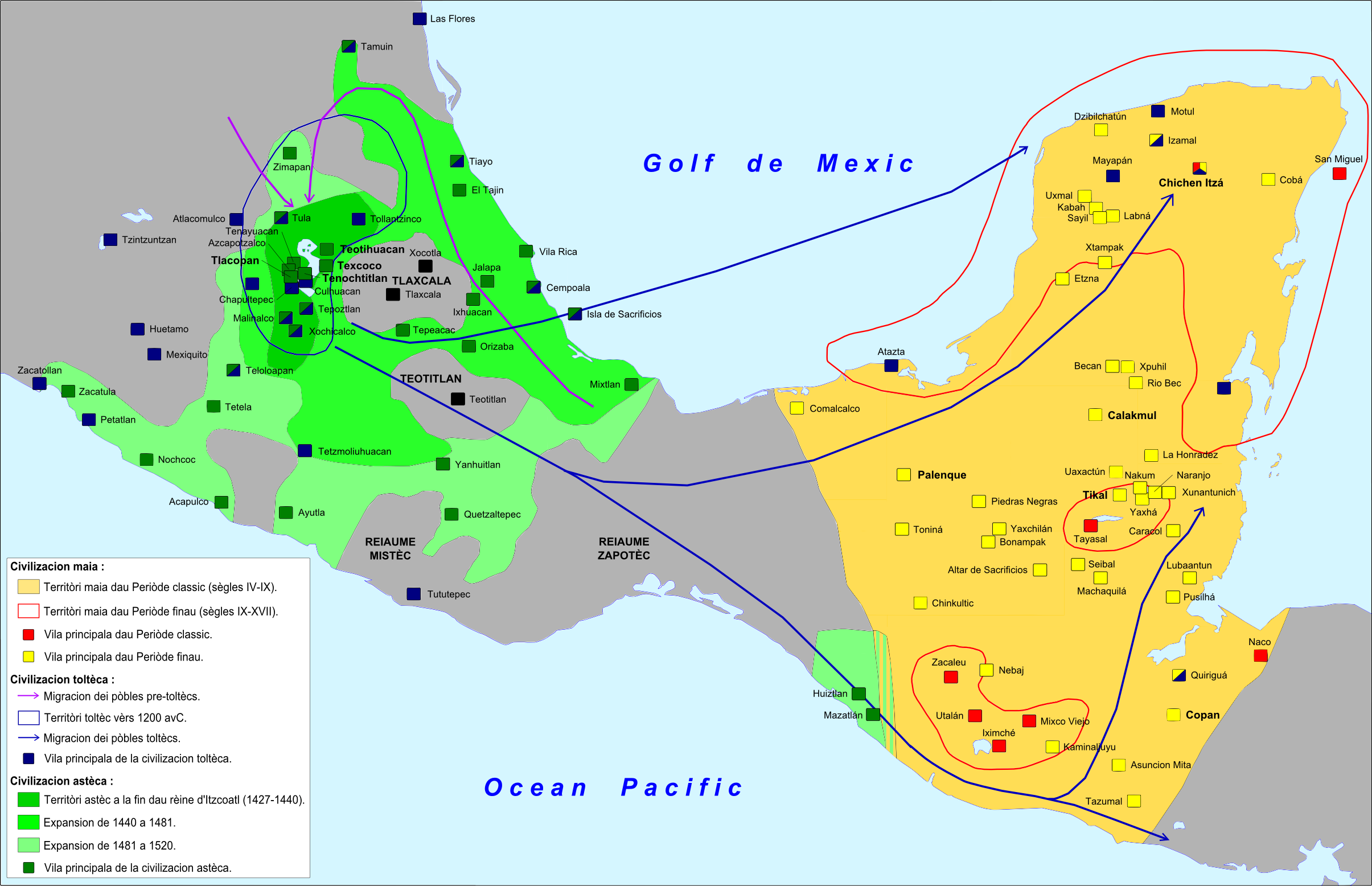 Civilizacions principalas de Mesoamerica dau sègle IV au sègle XVI.